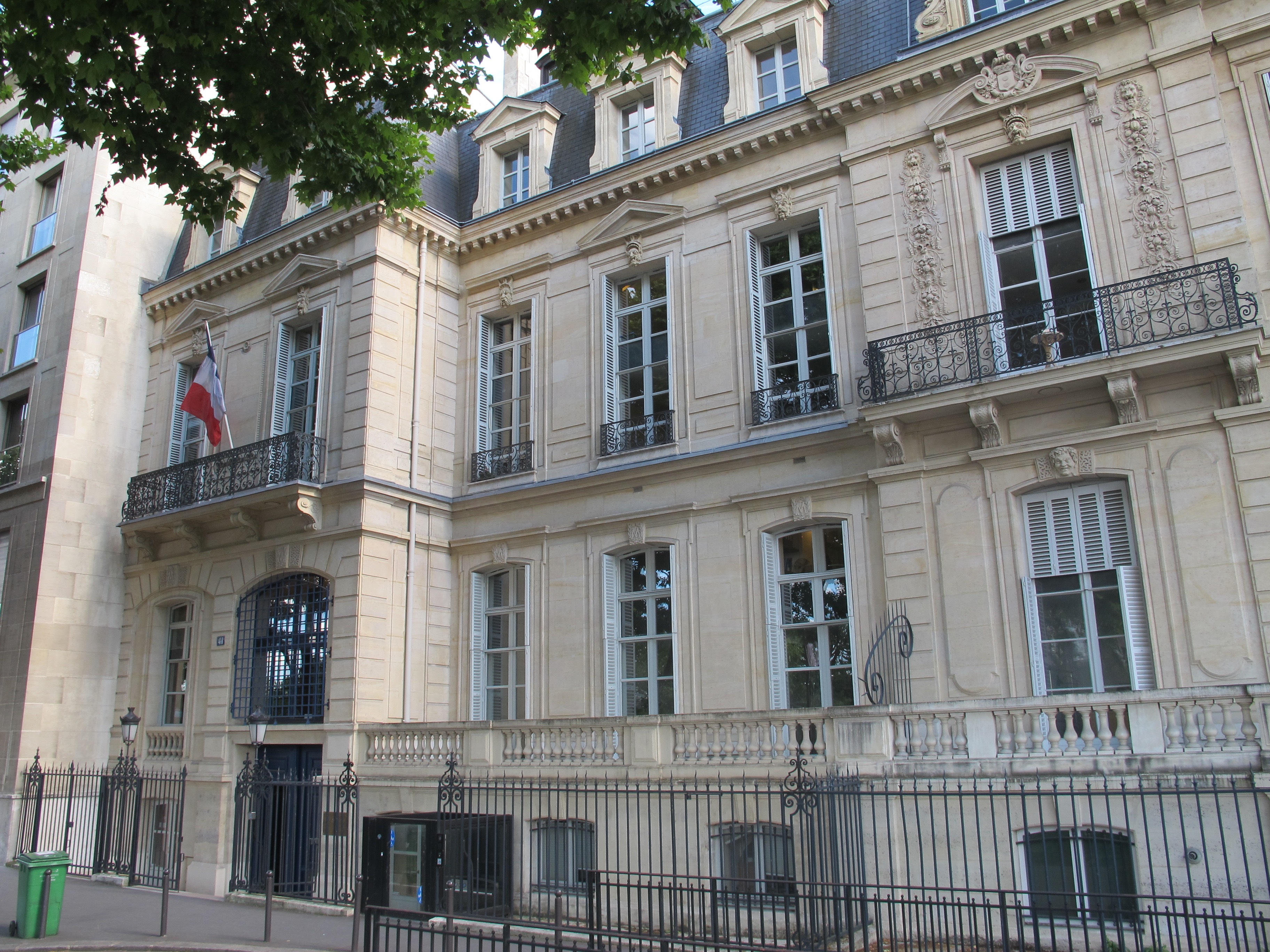 Siège de l'Association des maires de France, au n°41 quai d'Orsay (Paris, 7e).